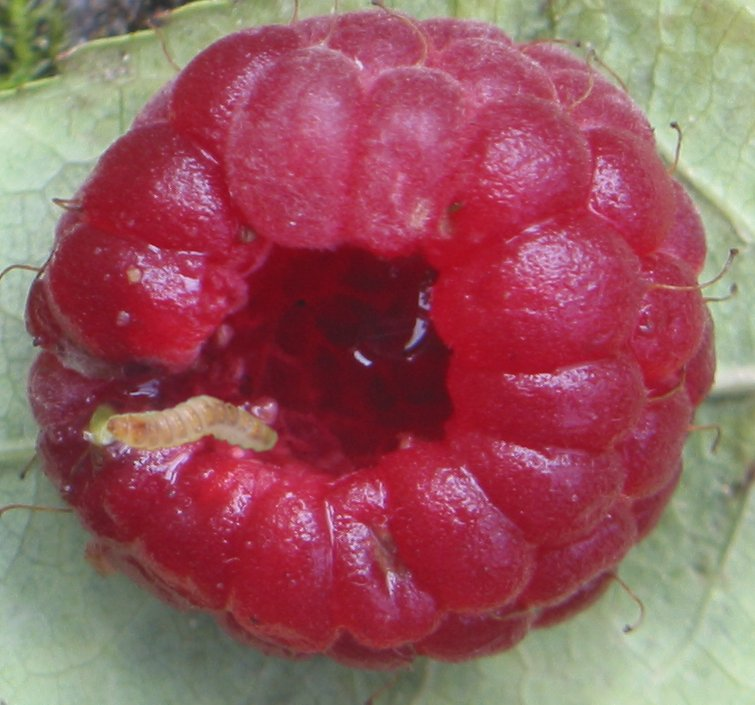 zelfgemaakte foto van de larve van de frambozenkever; derde week juli